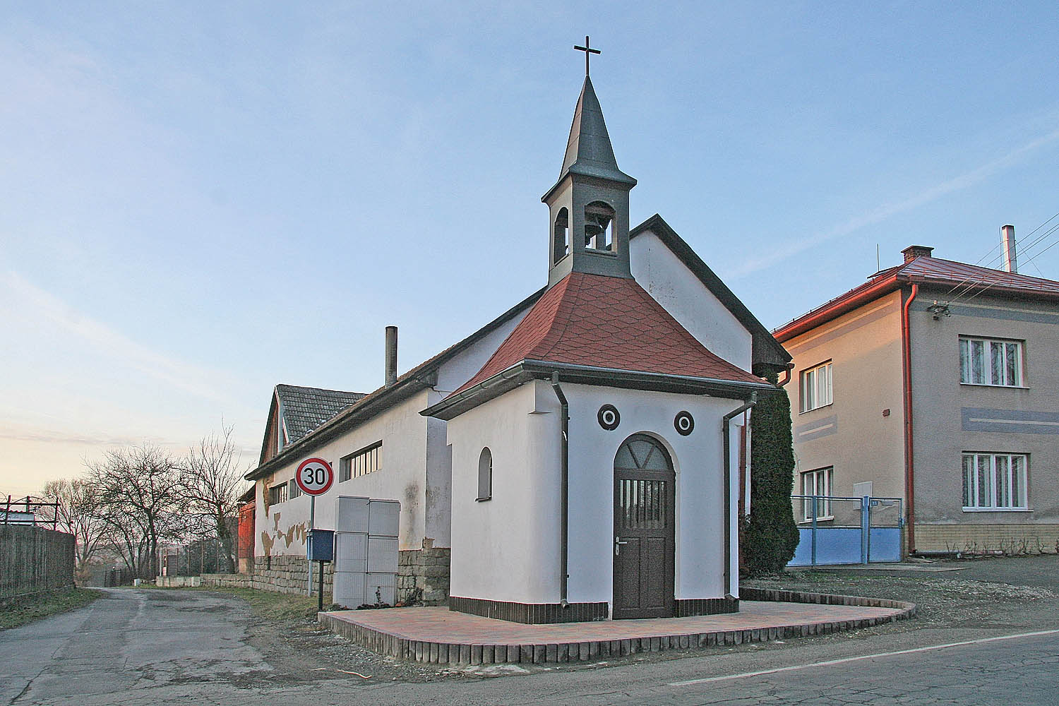 Kaple v obci Hradec v okrese Havlíčkův Brod